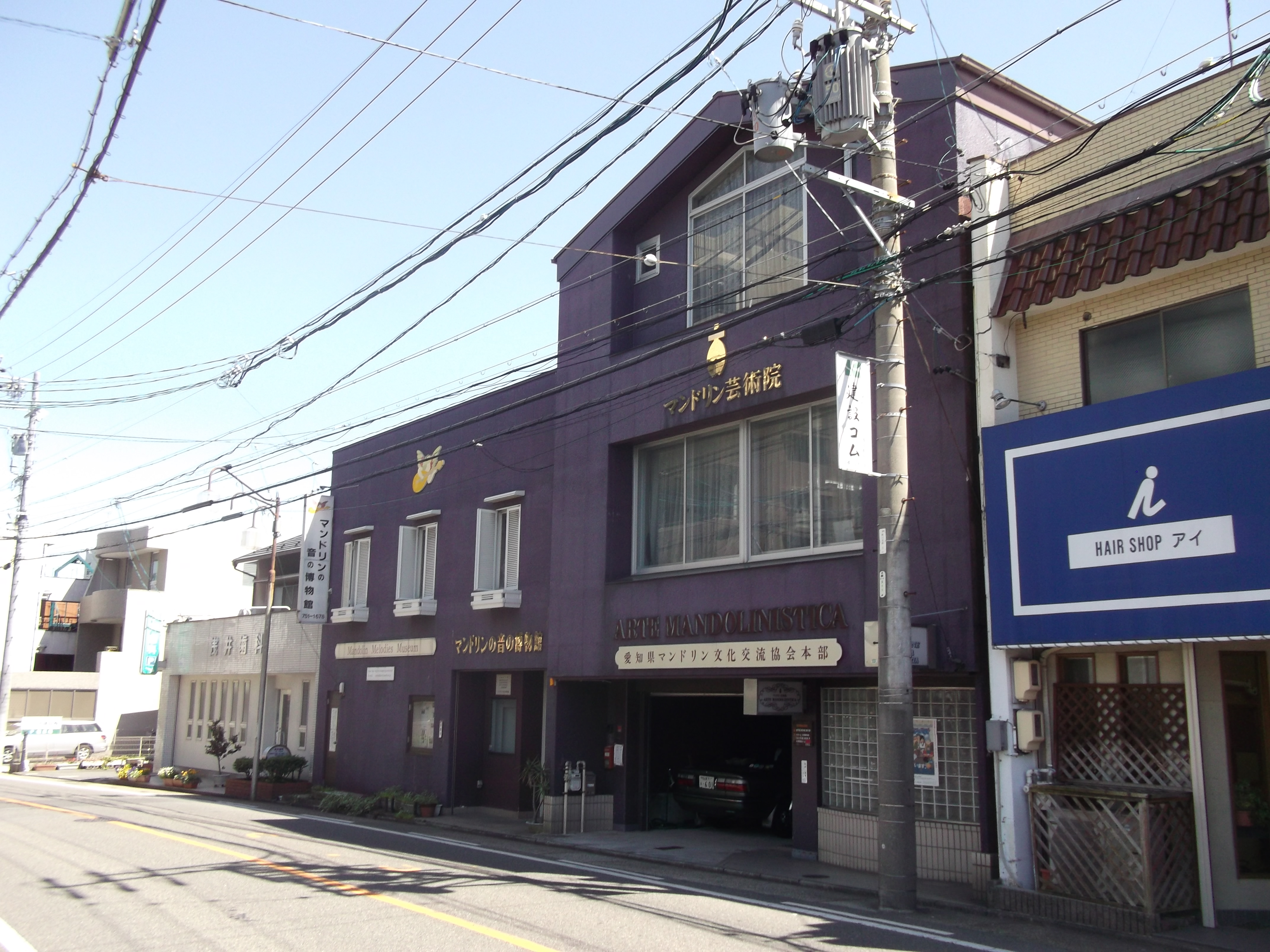 名古屋市昭和区川名本町のマンドリンの音の博物館を北側公道より写す